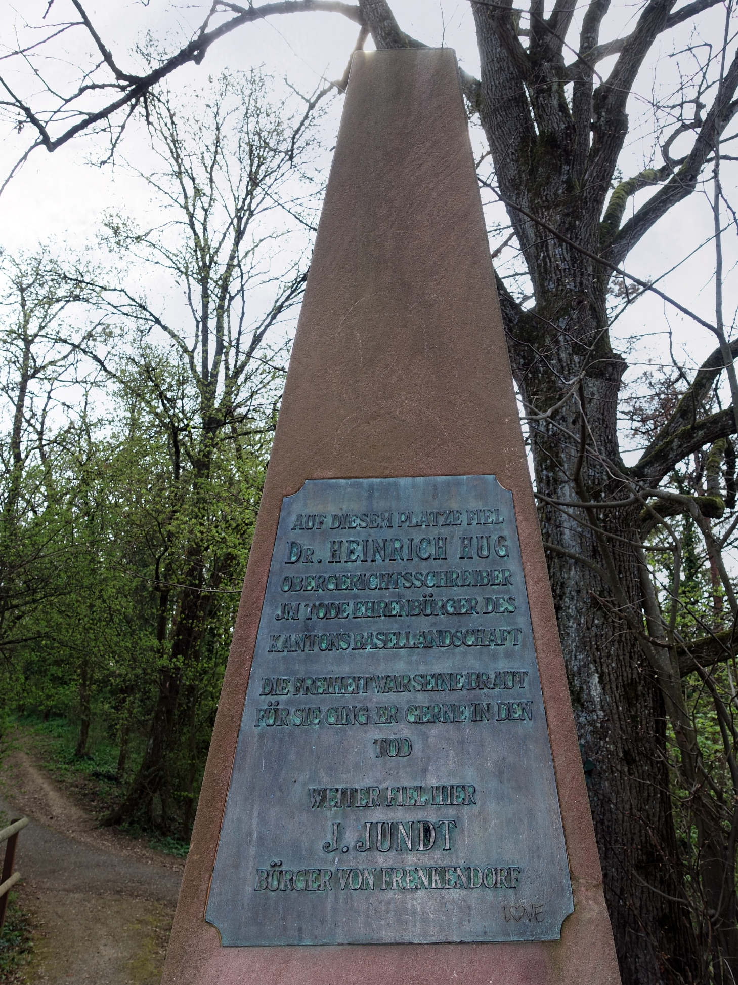 Hülftenschanz Denkmal Inschrift: Auf diesem Platze fiel Dr. Heinrich Hug Obergerichtsschreiber. Im Tode Ehrenbürger des Kantons Basellandschaft. Die Freiheit war seine Braut für sie ging er gerne in den Tod. Weiter viel hier. Am Hülftenschanz Denkmal Sockel ist folgende Inschrift zu sehen. An dieser Stelle brach Samstag den 3. August 1833 um die Mittagszeit der Ansturm der Basler Standestruppe unter blutigen Verlusten zusammen. Jhren Sieg nützen die Landschäftler Schützen durch rücksichtsloses Verfolgen des geschlagenen Gegners bis an die Birs aus.